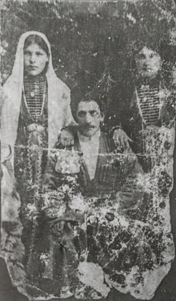 Бештавские ногайцы